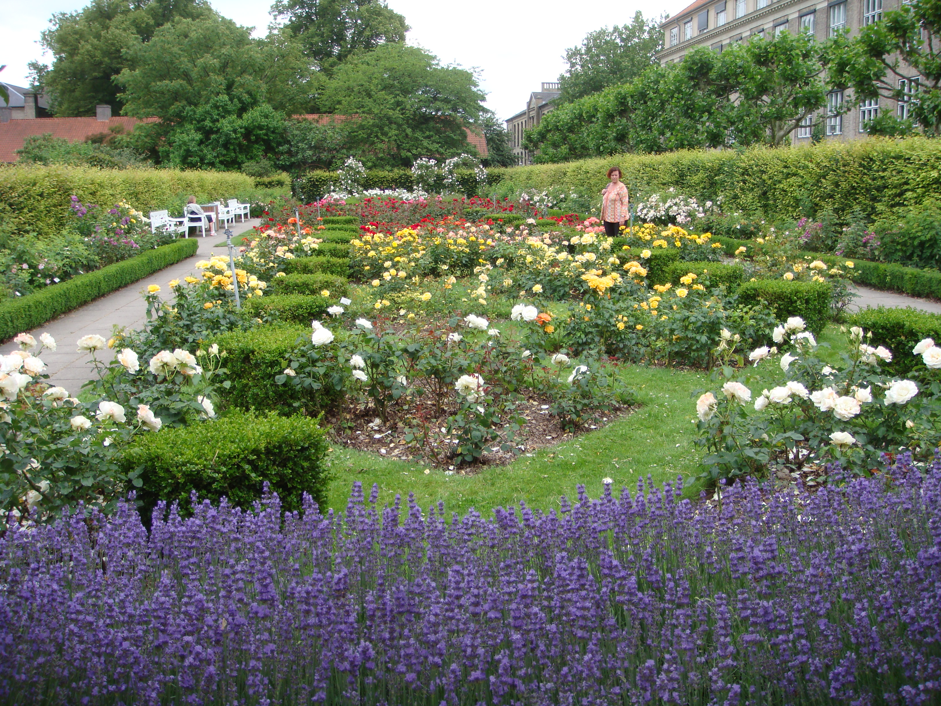 At the University Gardens in Frederiksberg - Landbohøjskolens Have.